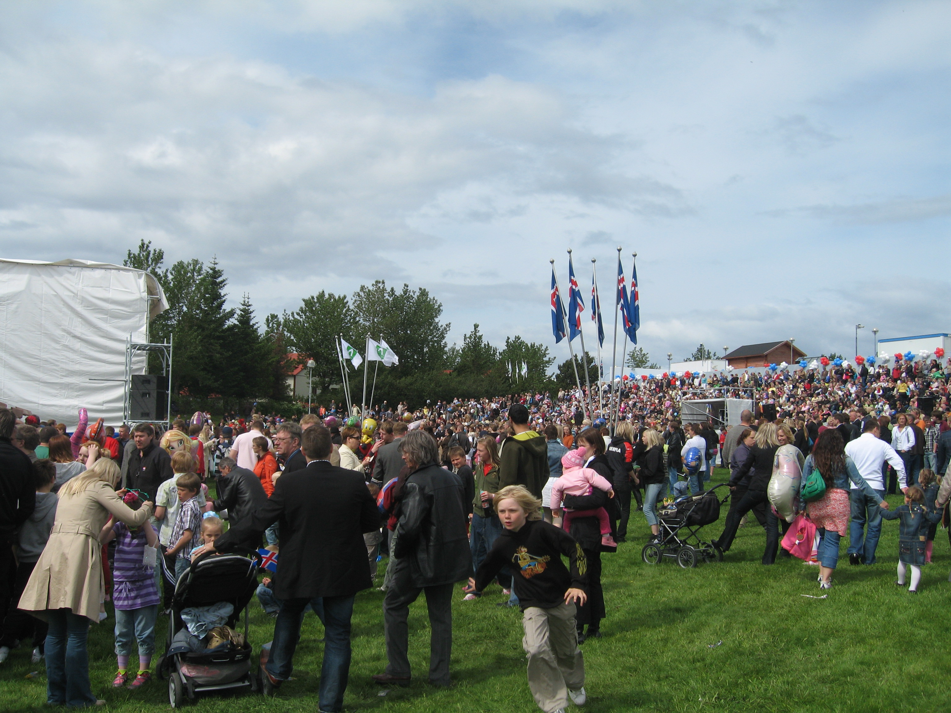 Rútstún on Icelands Independence day